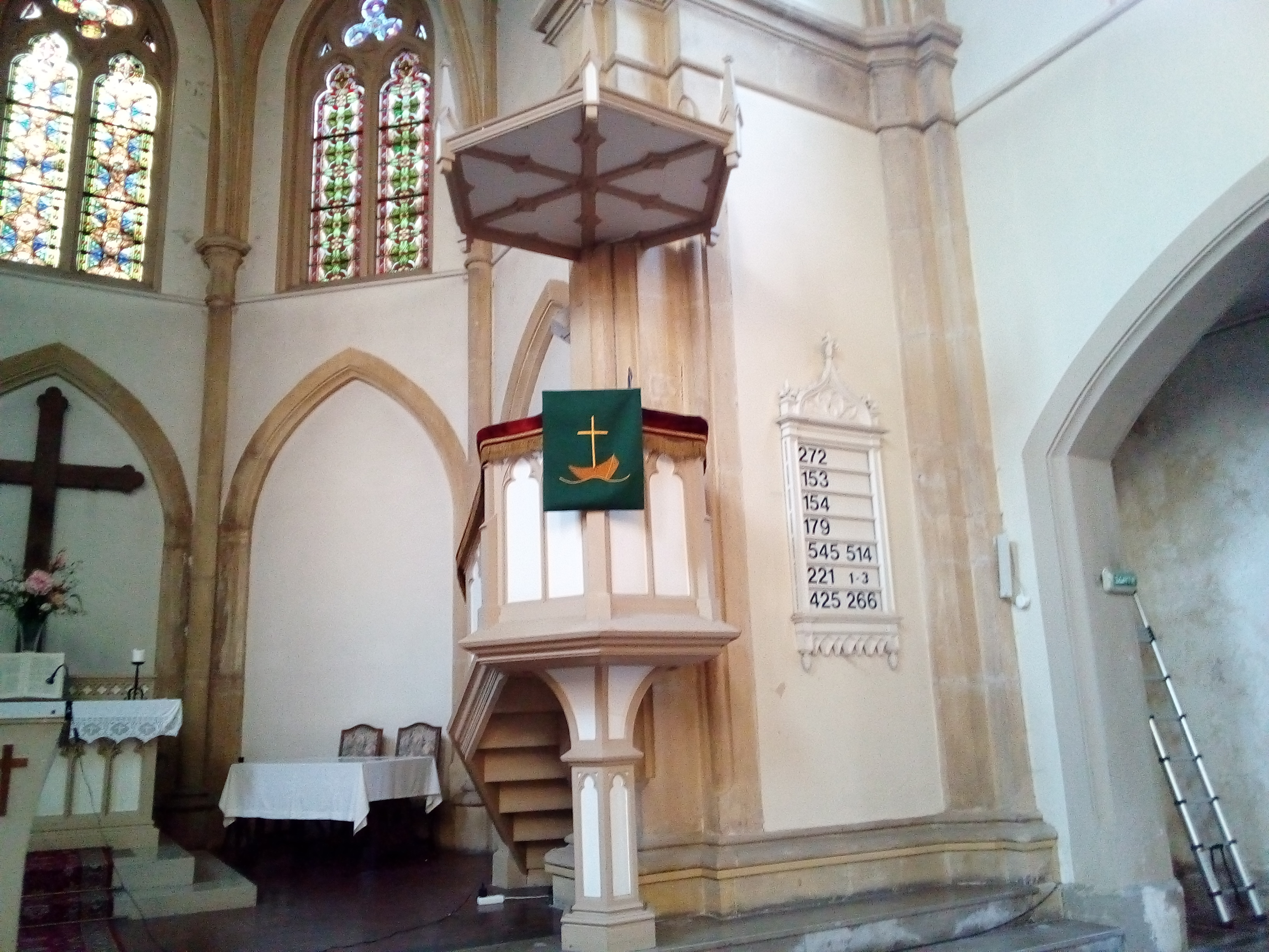 Chaire